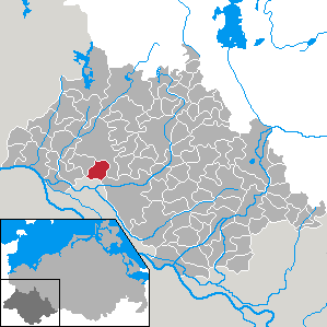 Brahlstorf in Mecklenburg-Vorpommern - district Ludwigslust